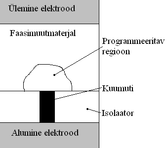 Faasimuutmälu struktuur